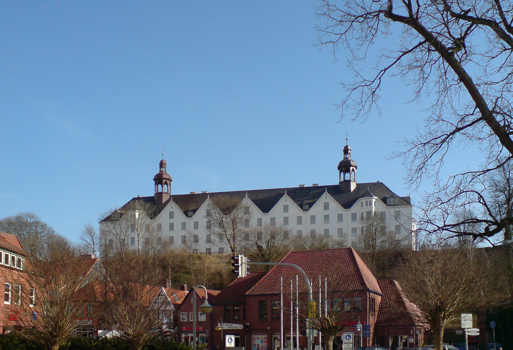 Schloss Plön, Stadtseite